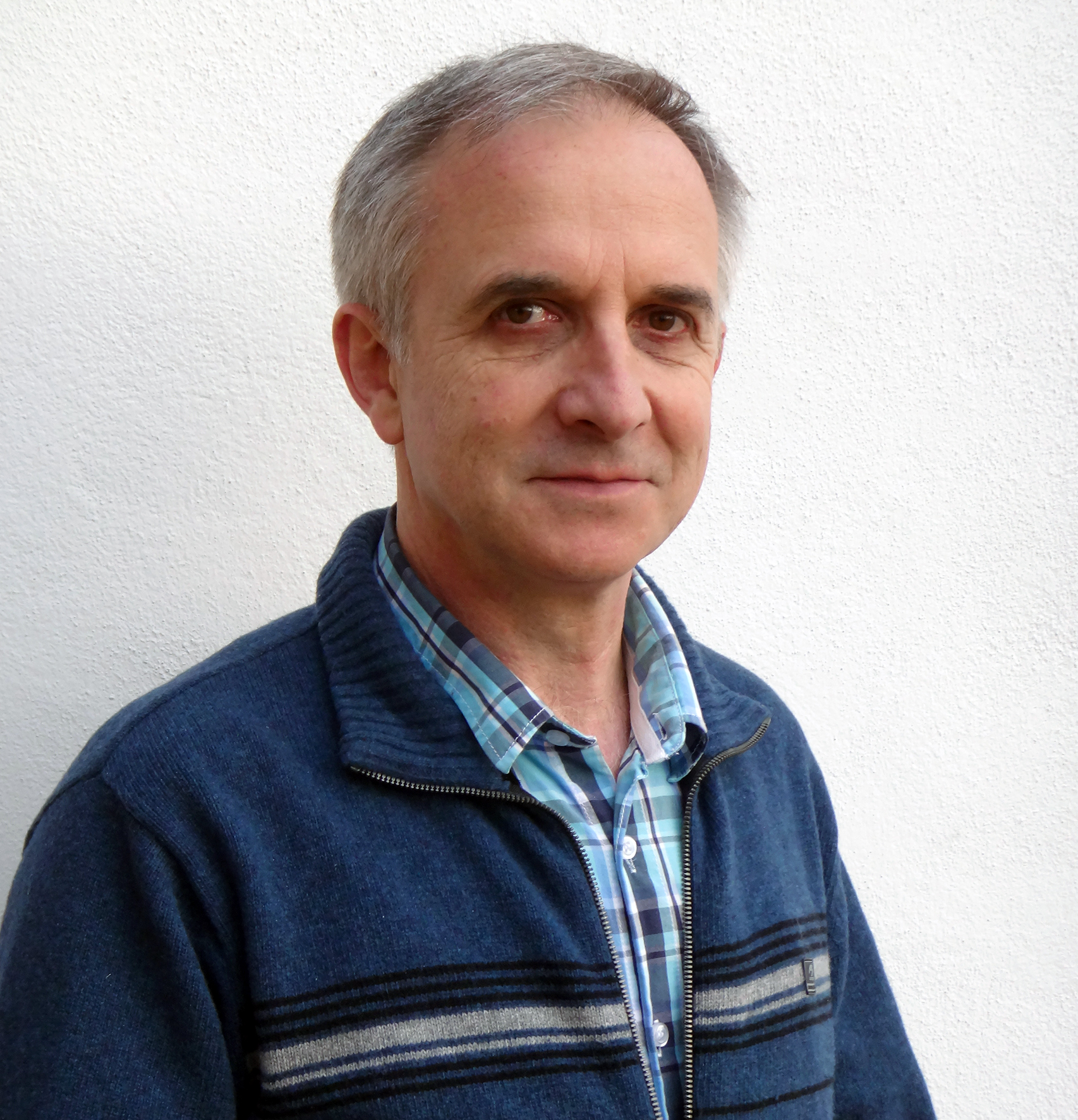 Juan Carlos Etxegoien Juanarena 'Xamar' idazlearen argazkia. Argazkilaria: Joanes Etxegoien